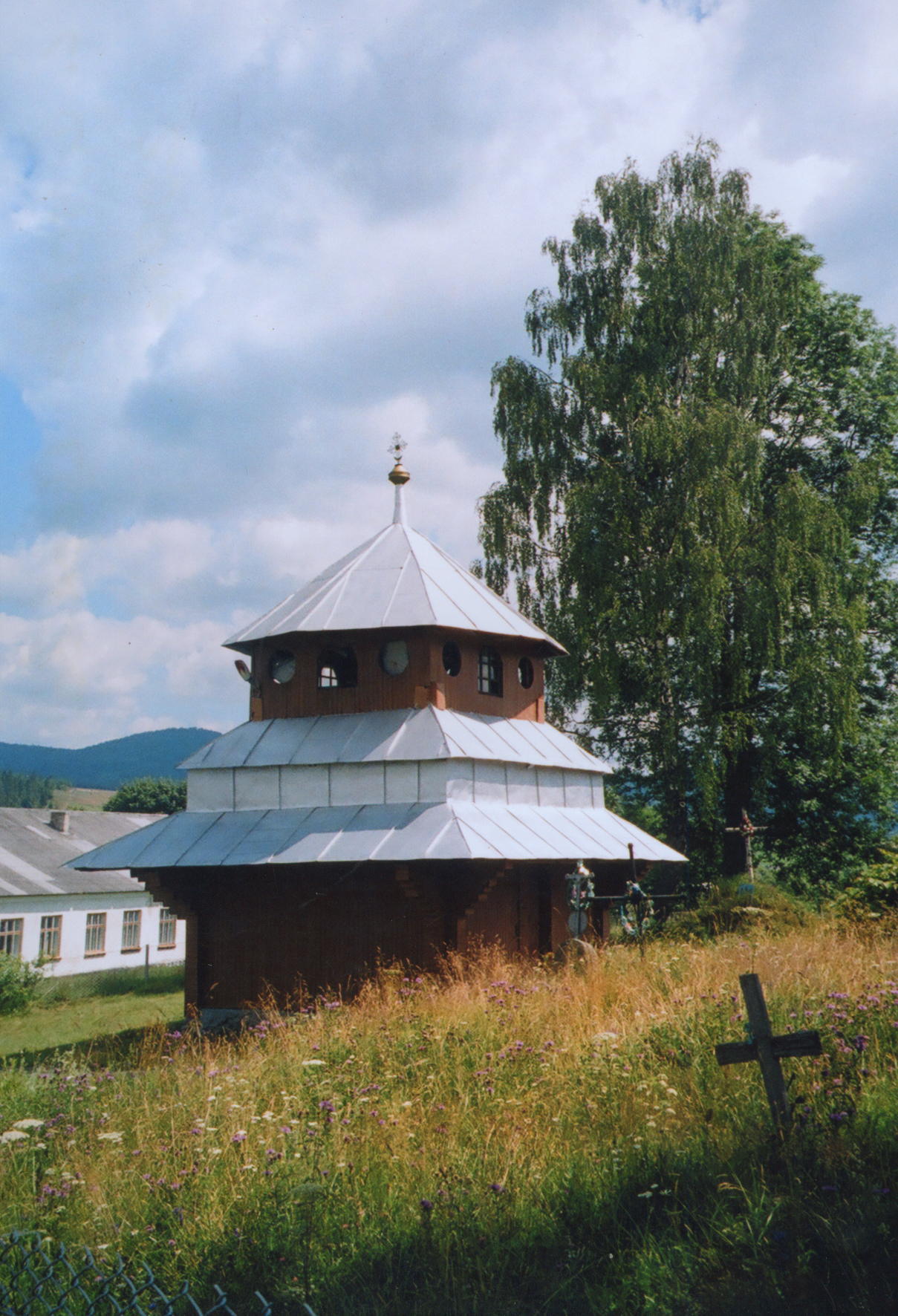 Дзвіниця біля церкви в селі Сможе Сколівського району Львівської області